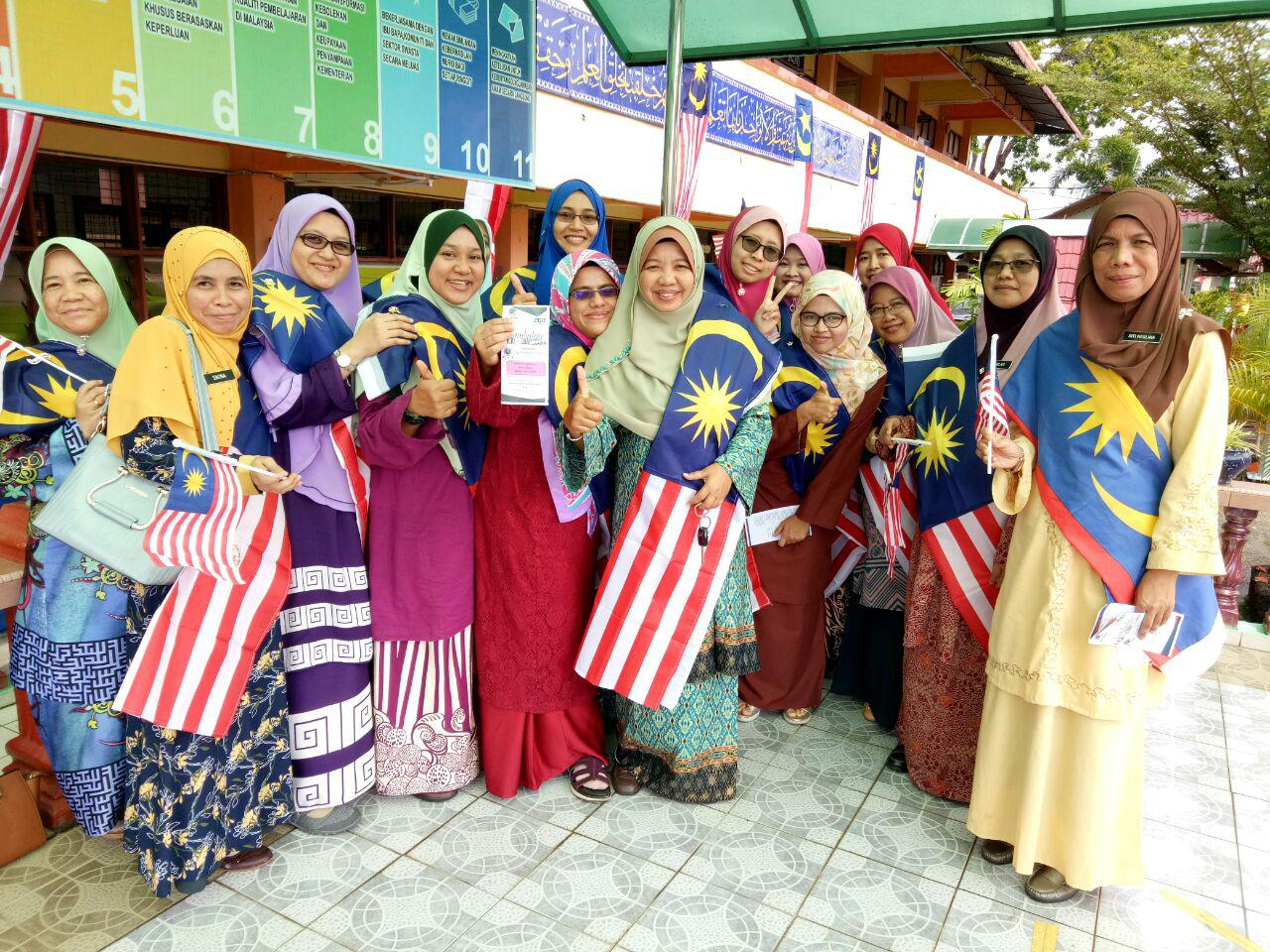 GURU MERDEKA